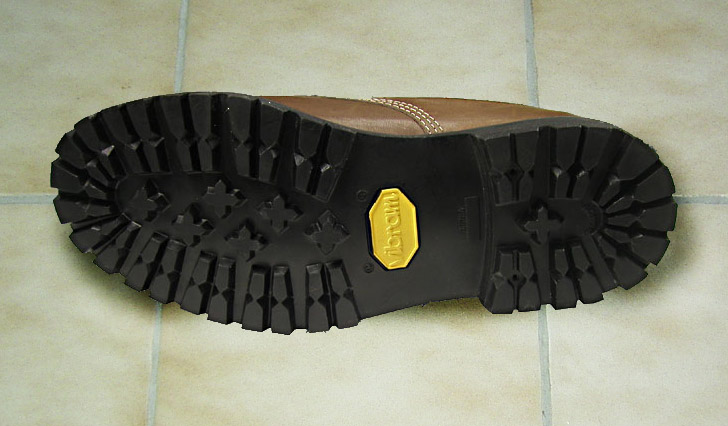 Vibram-Schuh